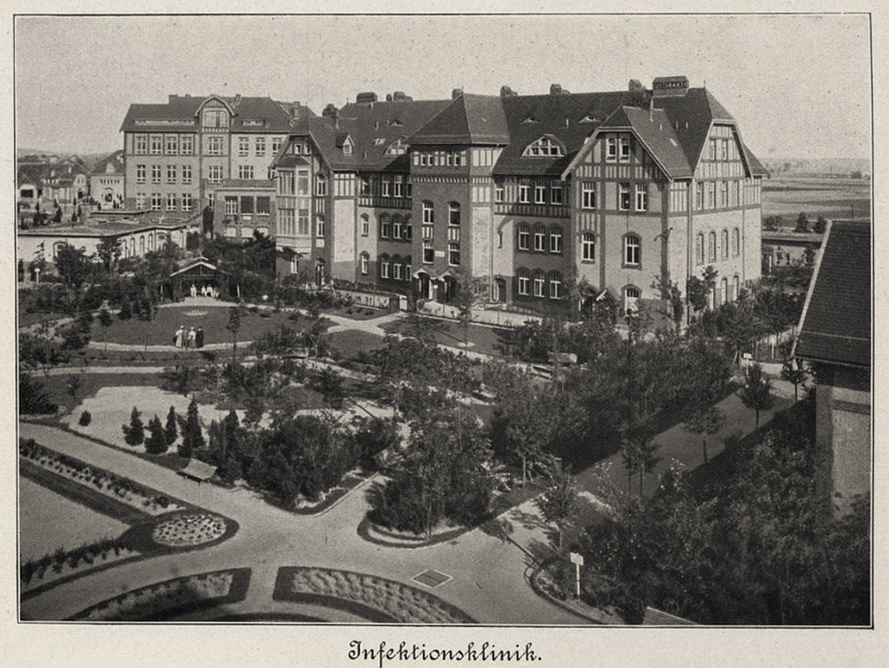 Allgemeine städtische Krankenanstalten, Infektionsklinik, Foto von 1908